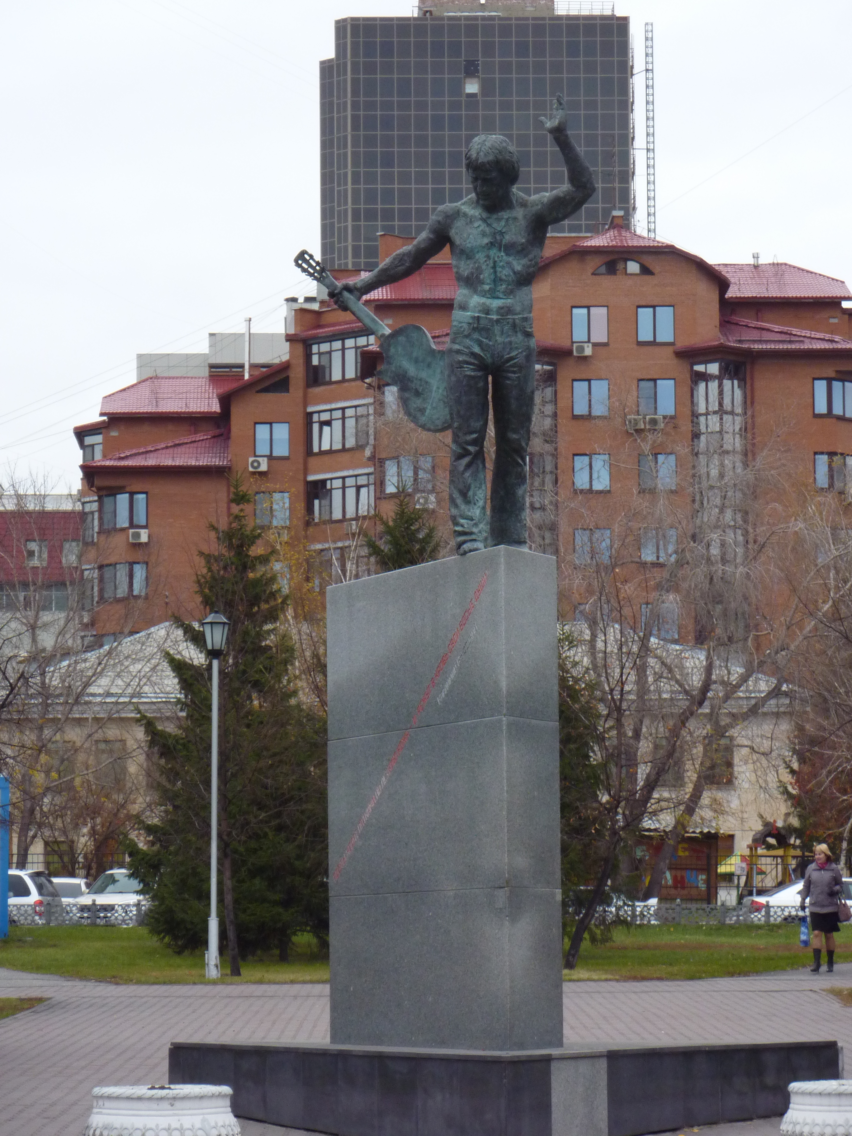 Высоцкий